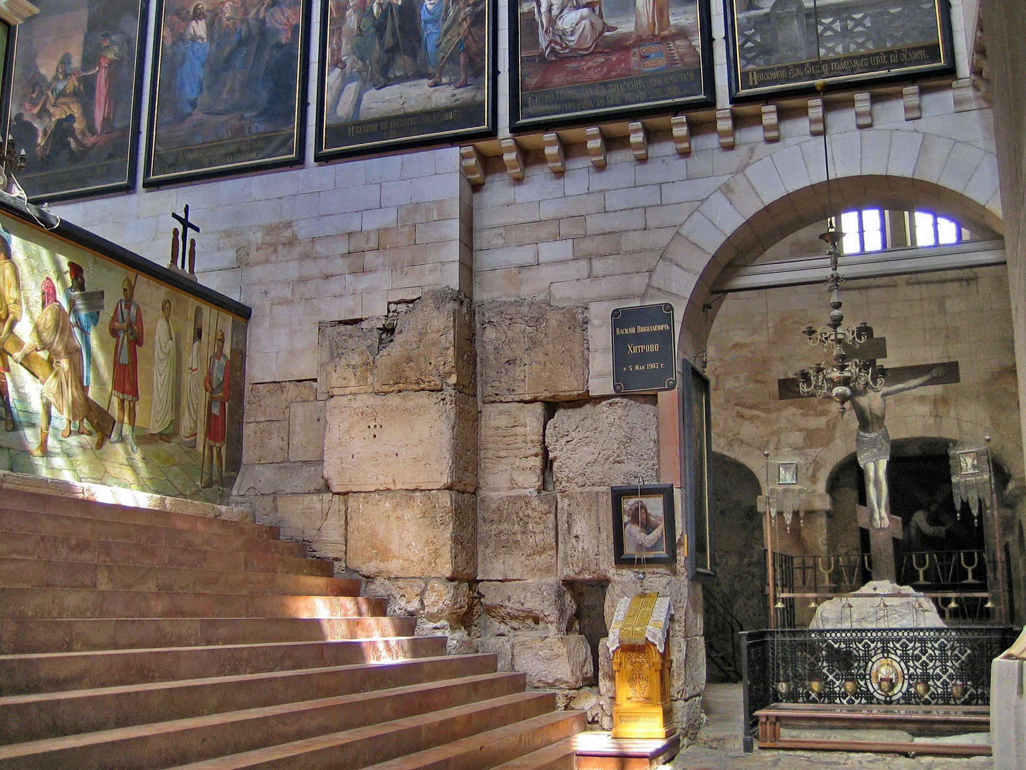 כנסיית אלכסנדר נבסקי, מנזר וכנסייה הנמצאים ברובע הנוצרי של העיר העתיקה בירושלים, במרחק כמה עשרות מטרים מכנסיית הקבר ומול הכניסה הצפונית לכנסיית הגואל.